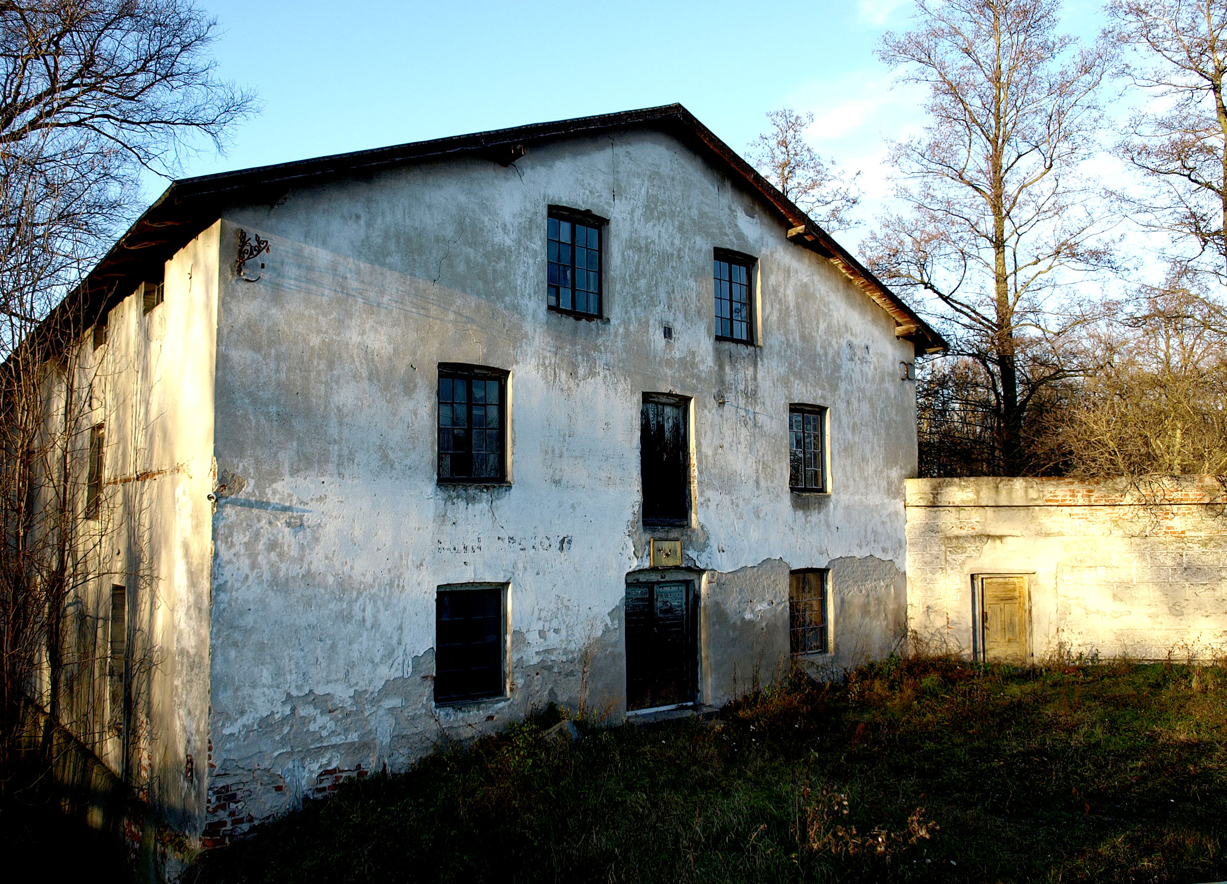 Stary młyn w Gościeńczycach